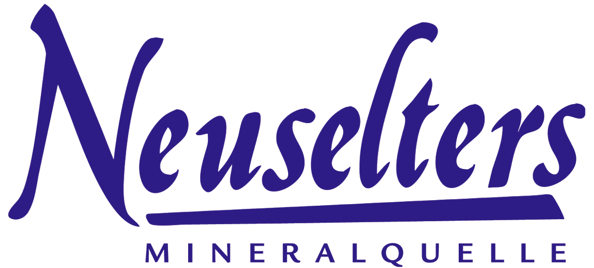 Neuselters-Schriftzug